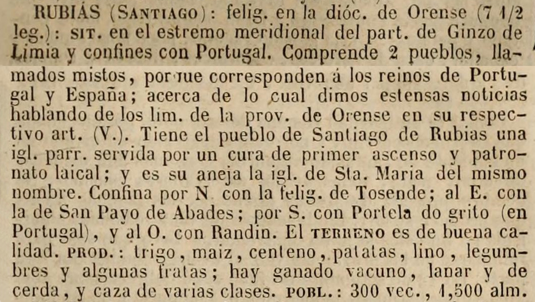 Rubiás dos Mixtos no Diccionario geográfico-estadístico-histórico de España y sus posesiones de Ultramar.